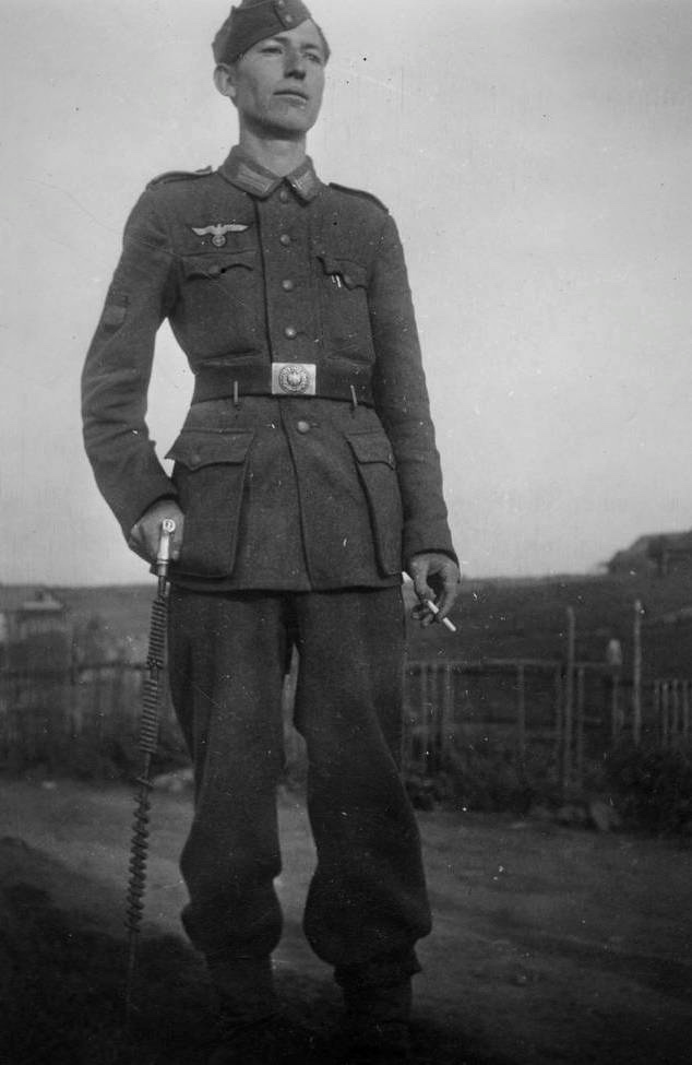 Soldado no identificado de la División Azul española en el Frente Oriental.